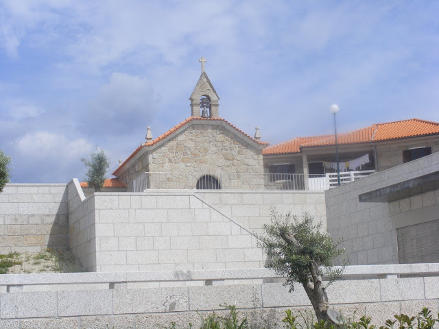 Amarante Igreja Matriz de Cepelos frente